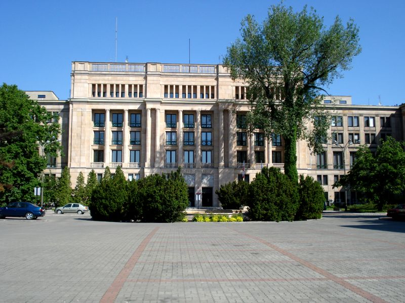 Ministerstwo Finansów w Warszawie przy ul. Świętokrzyskiej 12